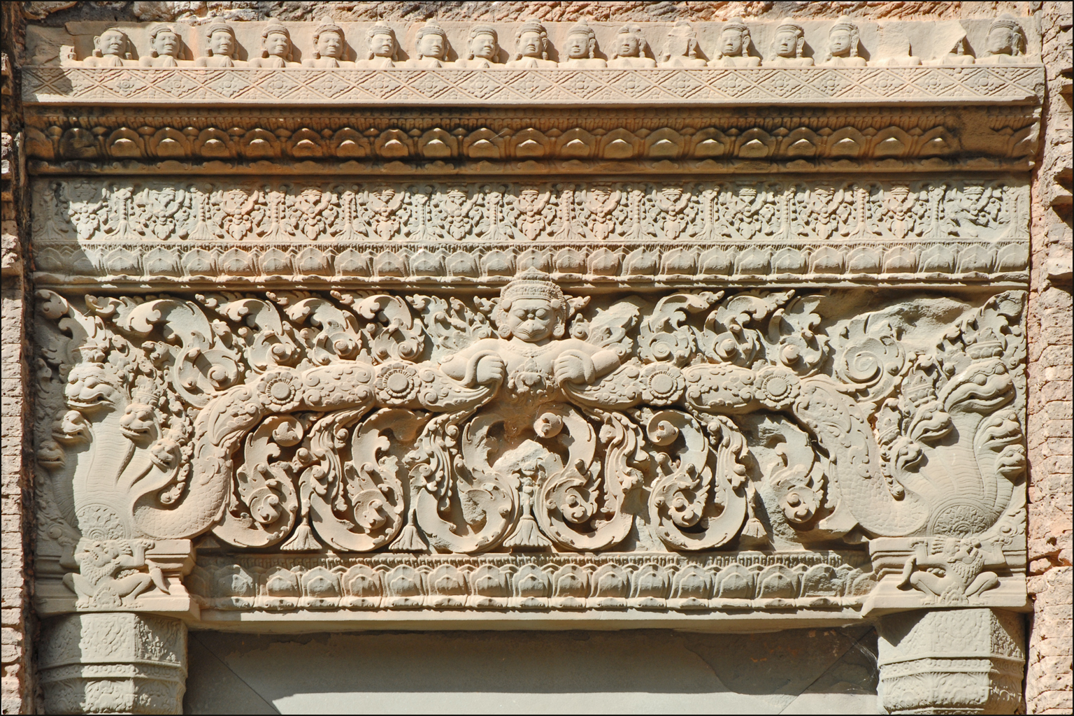 Linteau d'une des tours centrales du temple Preah Kô avec Garuda tenant des naga(s) au centre d'un décor végétal Ce temple dont le nom signifie "Taureau sacré" fait partie du groupe de Rolûos (situé à 15Km de Siemreap) avec les temples Bakong et Lolei. Il date des années 877-893, il est le temple du roi Indravarman 1er dont le palais devait se trouver à proximité. Il était consacré au culte de Shiva dont la monture est le taureau Nandin. Il est construit en briques avec des décors en stuc et des encadrements de porte ou de fenêtre en grès sculpté, Plusieurs sculptures en grès ont été encastrées dans les murs, elles ont été déplacées dans les musées pour des raisons de conservation. Certains décors ont été sculptés directement dans les briques. Les chaussées sont pavées de dalles de latérite qui est le matériau utilisé aussi pour les murs d'enceinte. Les six tours centrales du temple, orientées à l'est, sont construites sur un socle de 31 m sur 24m recouvert de plaques de grès. Les tours étaient consacrées aux ancêtres divinisés du Roi et à leurs épouses. Elles possèdent des linteaux finement sculptés de grande qualité esthétique.